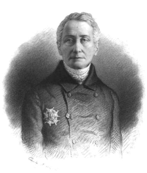 Abraham Gabriel Marguerite Delessert.